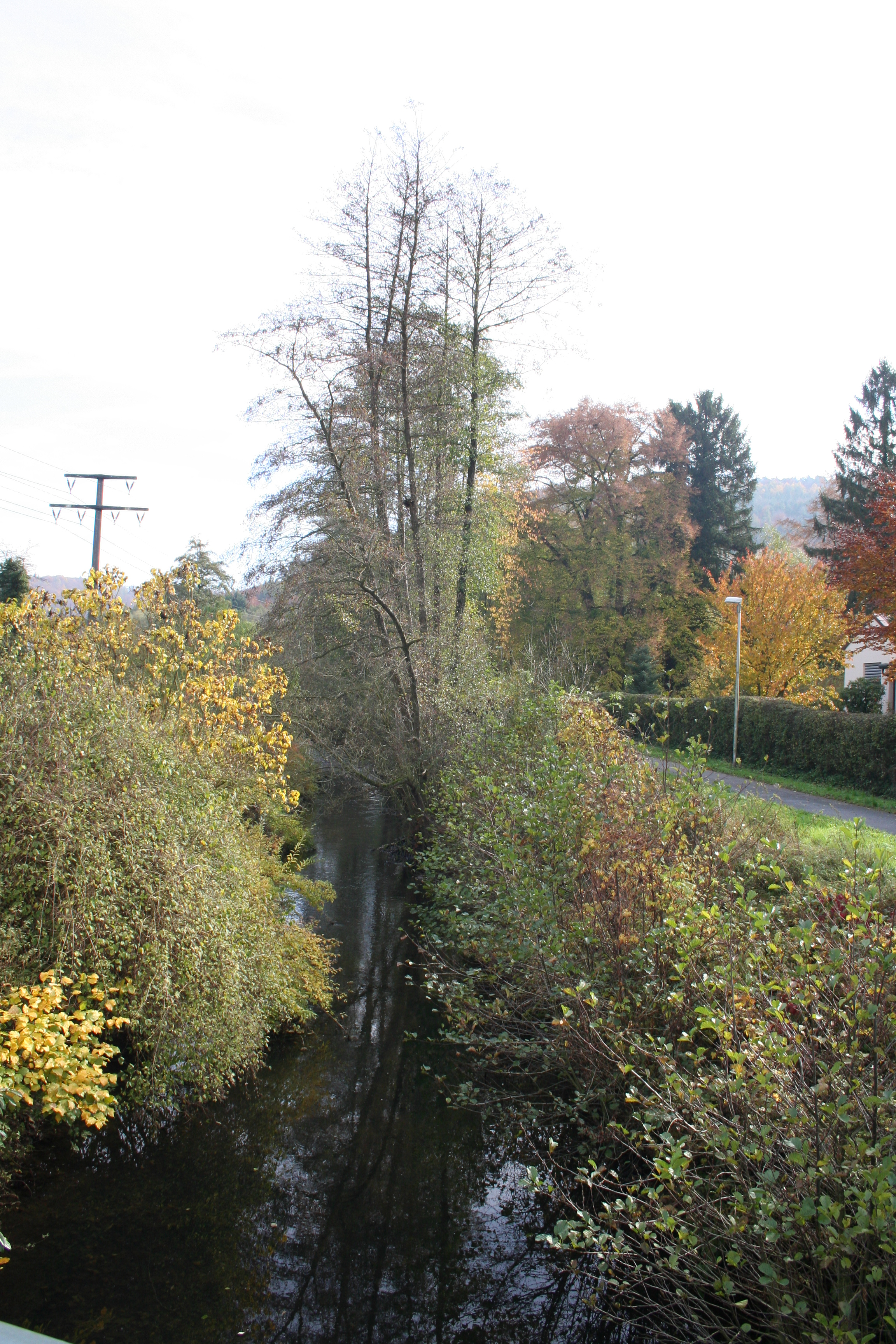 Lauf der Elsava in Elsenfeld zwischen Ortsteilen Rück (linke Bildseite) und Schippach (rechts)